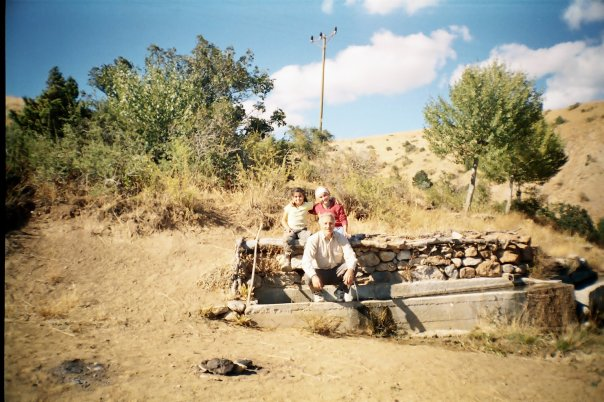 Çeşme başında oturan insanlar